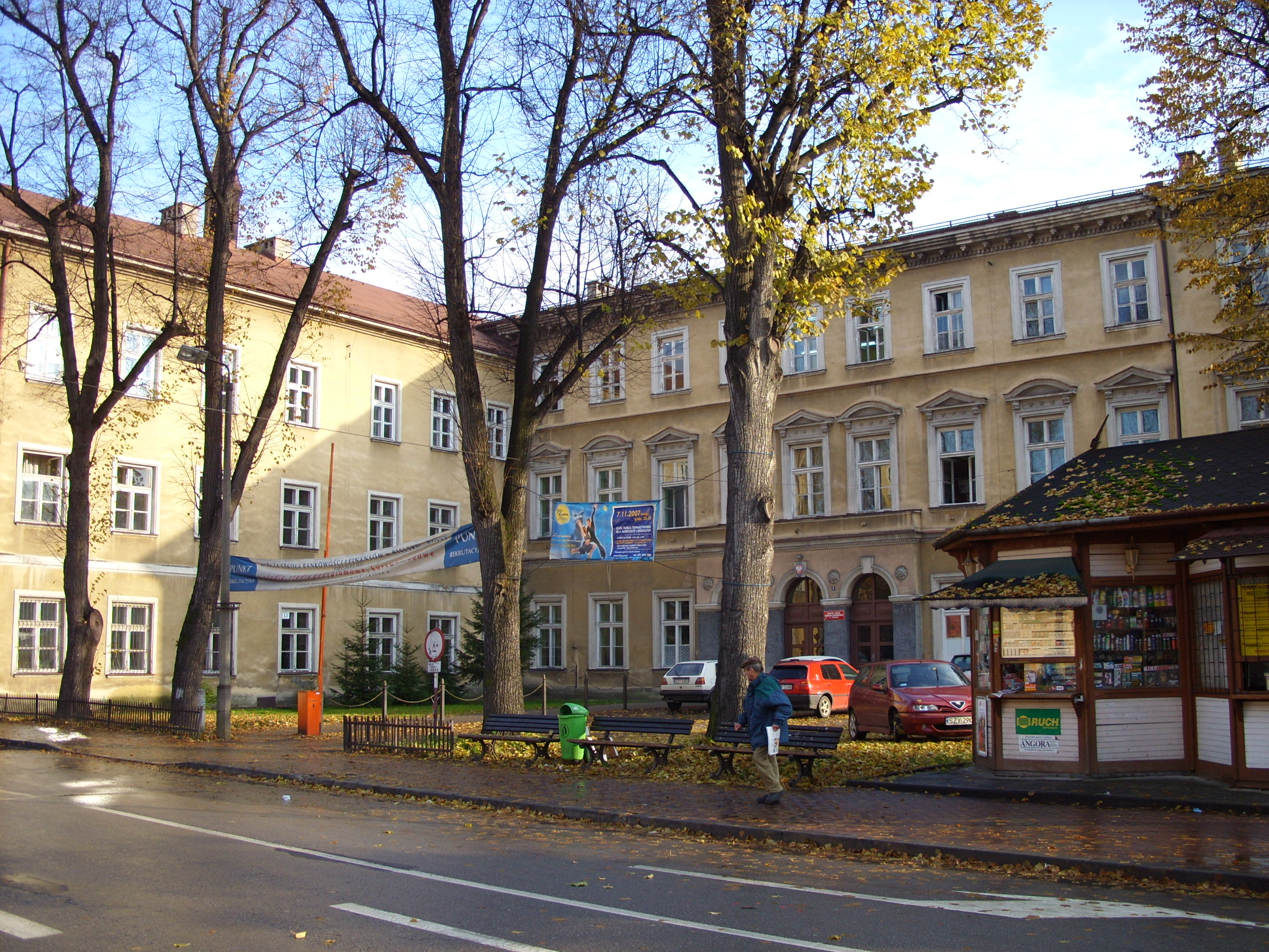 ZSEG Żywiec